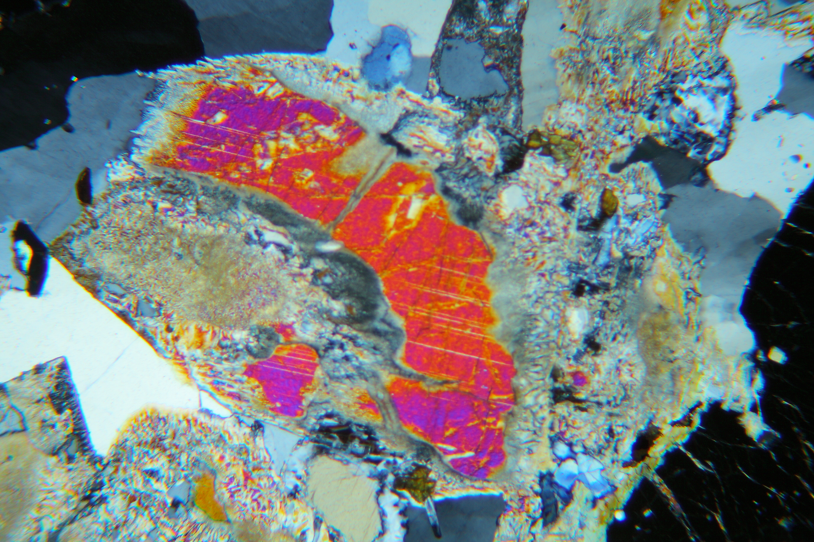 Partiell retrograd überprägter Eklogit von Förstenreuth (Münchberger Gneismasse) (Dünnschliff, XPL): Die Relikte von Omphacit fallen durch ihre bunten Interferenzfarben auf. Daneben Quarz (grau), Zoisit (blau), Granat (schwarz).